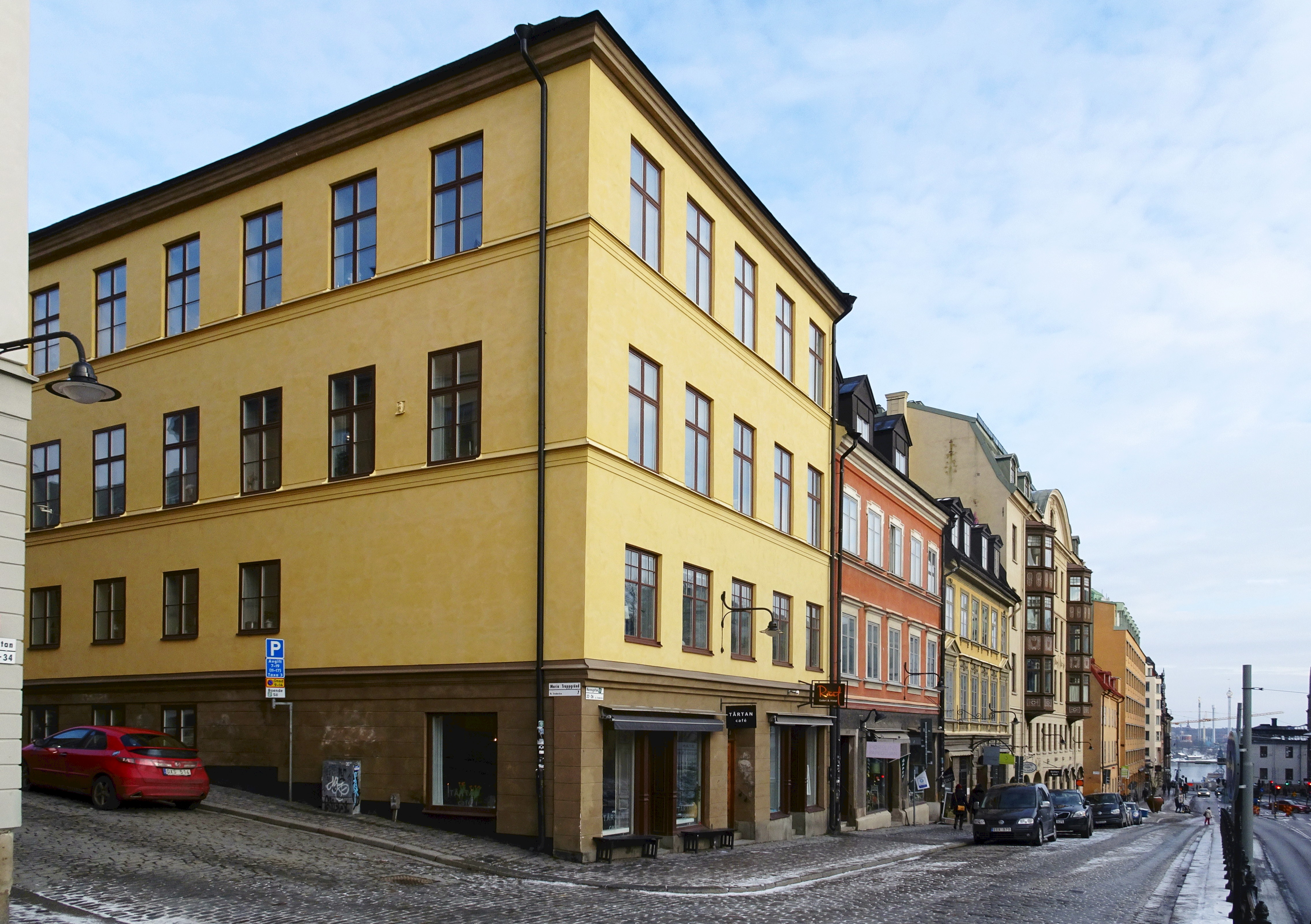 Kvarteret Stenbocken vid Hornsgatspuckeln, mot öster